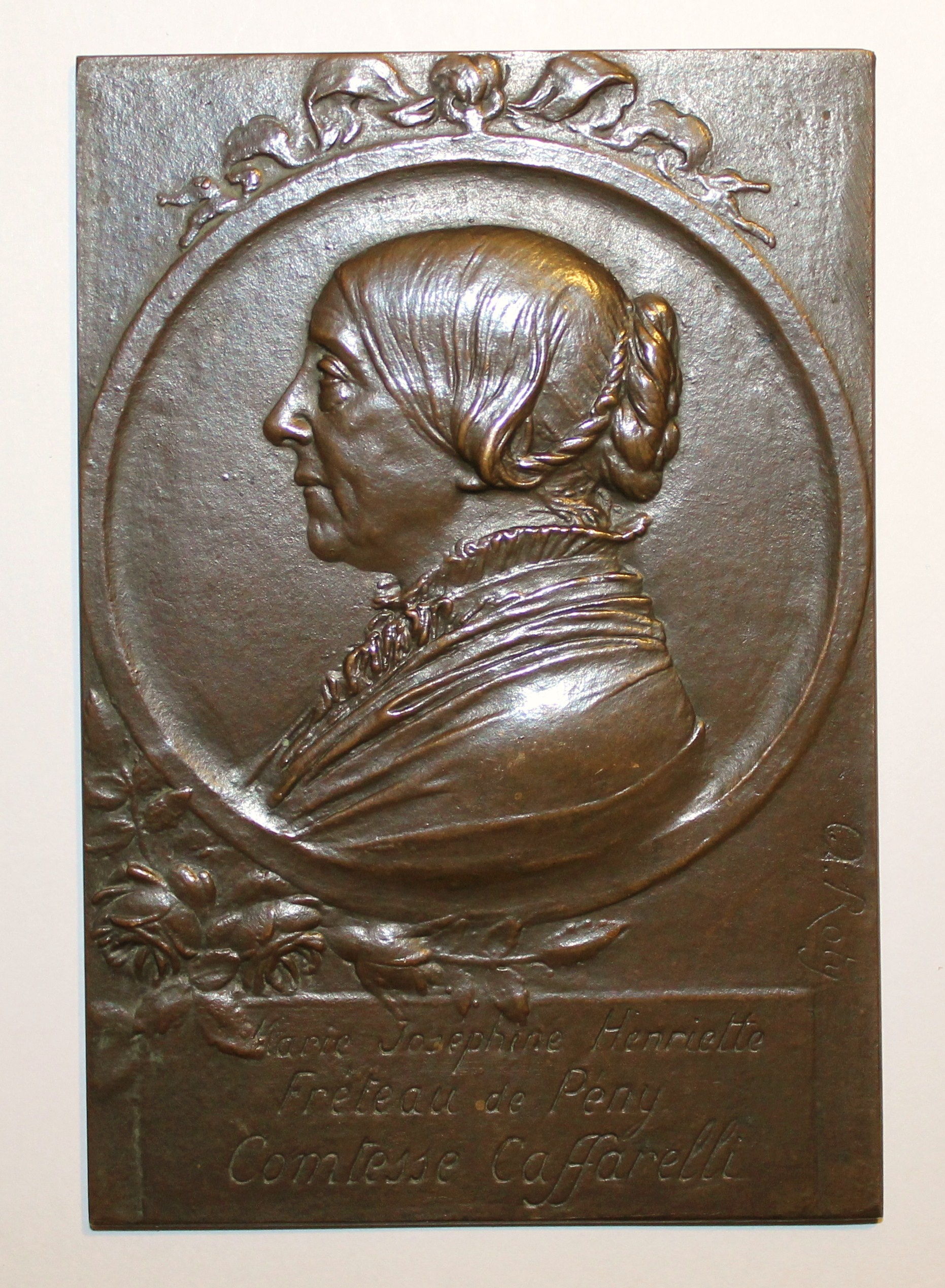 Marie Joséphine Henriette Fréteau de Pény, comtesse Caffarelli (1815-1891) inhumée au cimetière de Leschelle, seconde épouse de Eugène Auguste de Caffarelli. Fonte en bronze réalisée en 1882 par Oscar Roty.